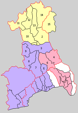 兵庫県有馬郡の町村制時点の町村。